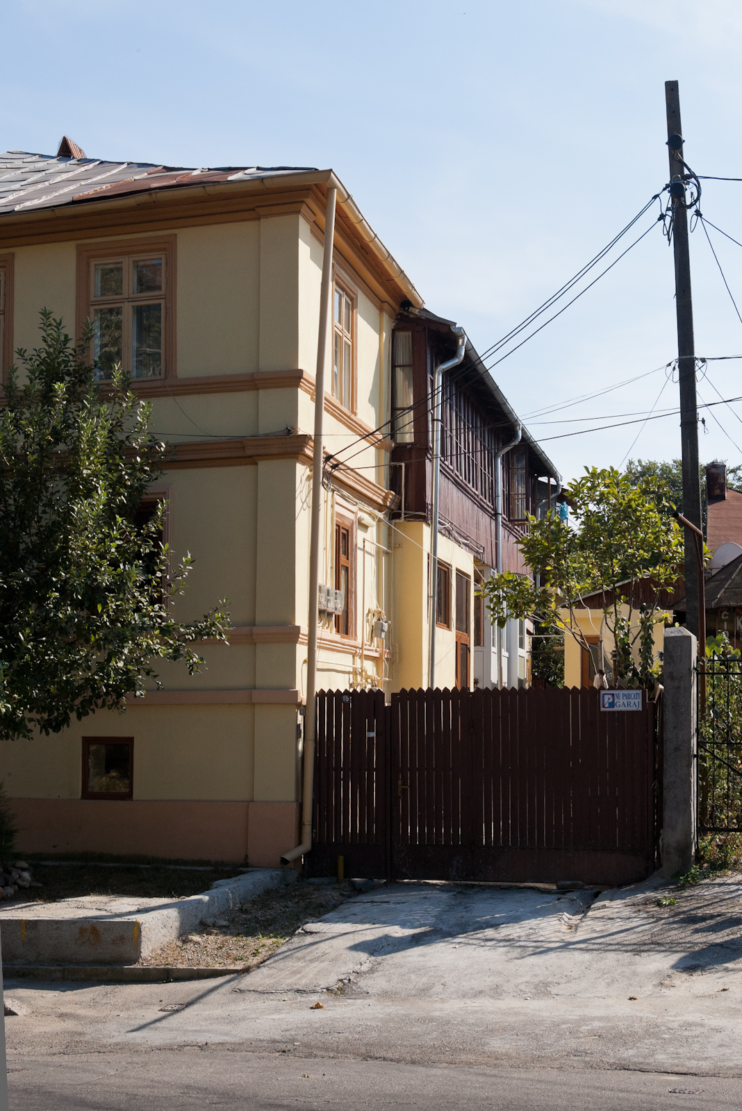 Fotografia prezinta casele Marinescu de pe str. Teilor 13-15.